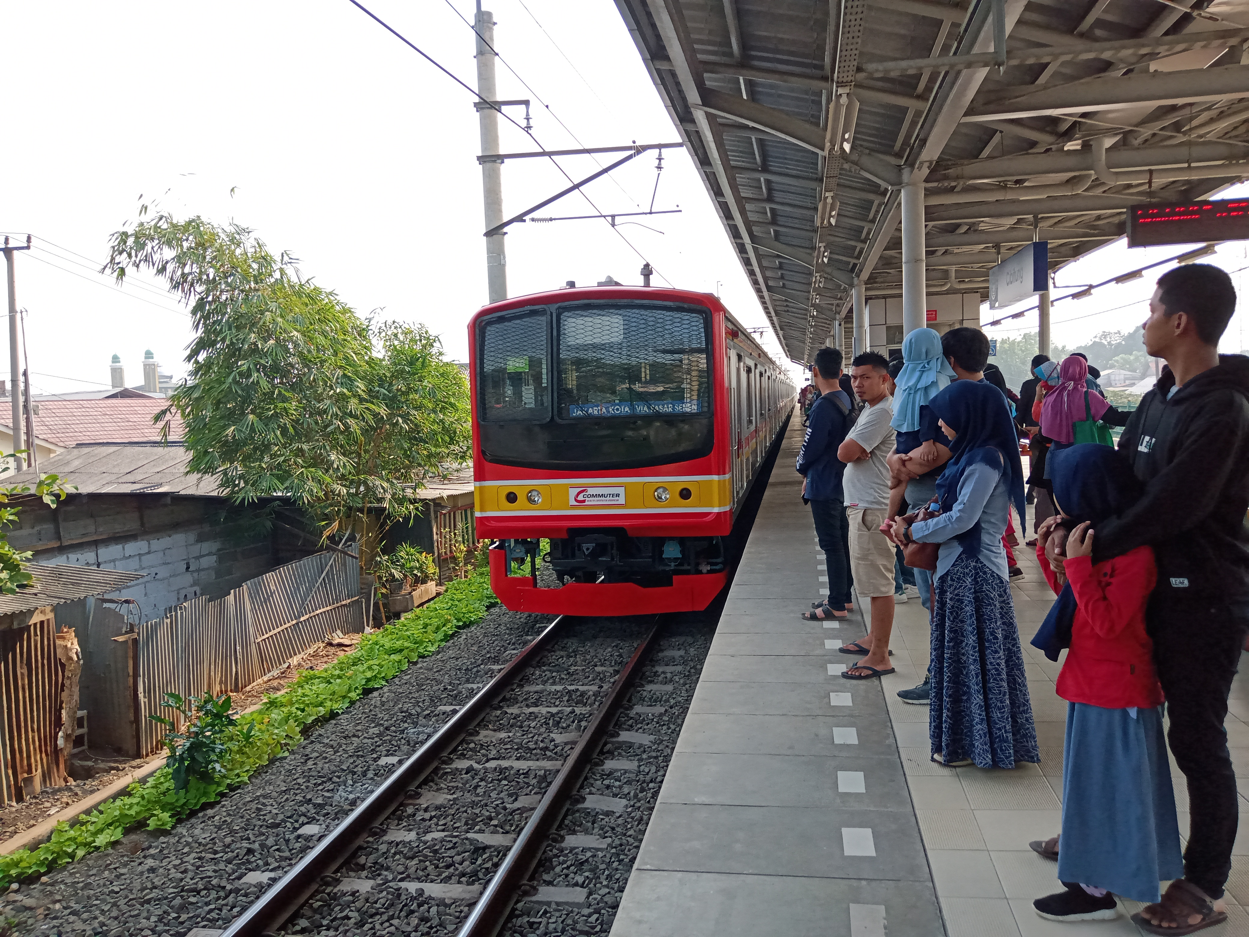 D1/1473B JR 205-148F Marchen Face masuk Stasiun Cibitung